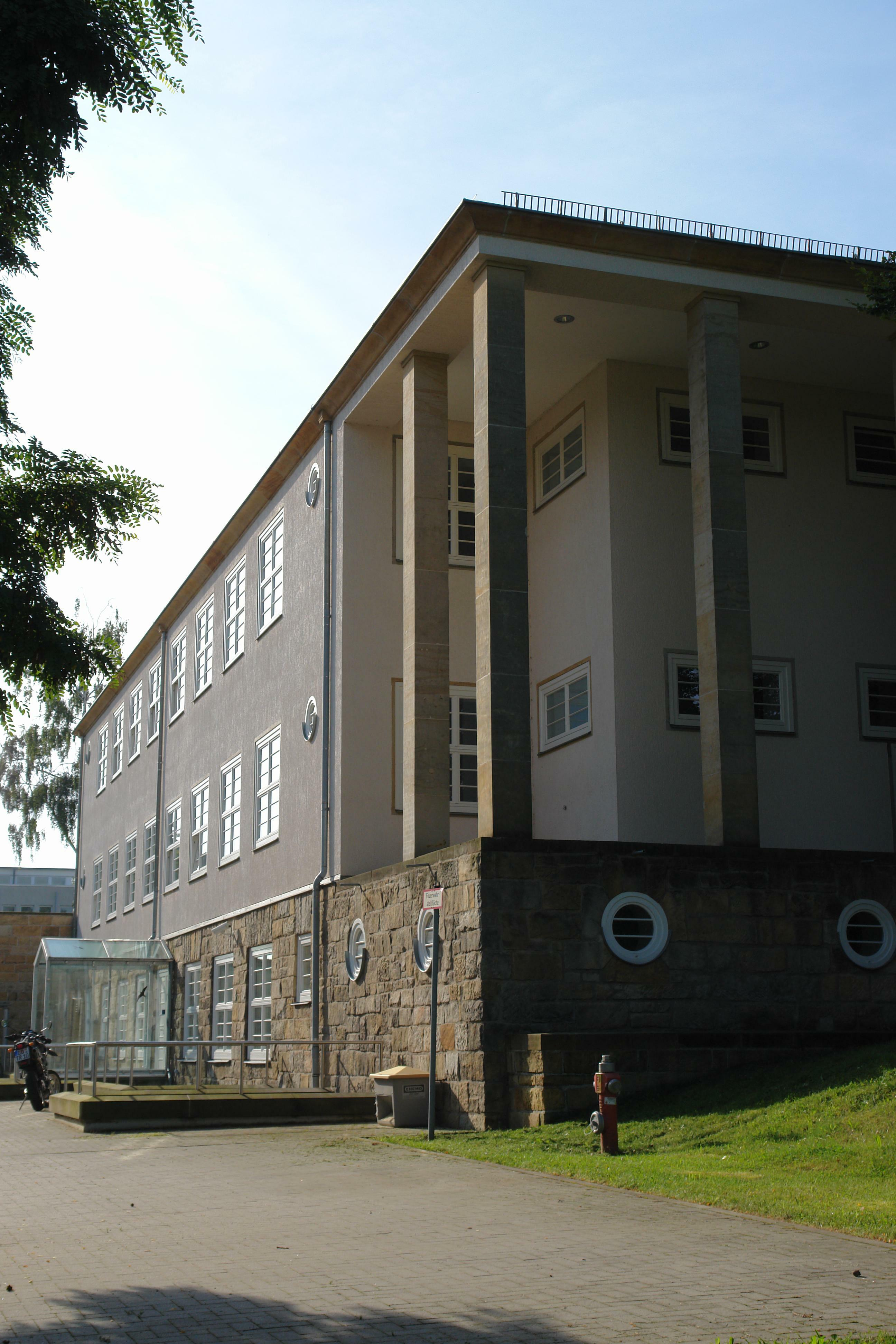 BG-Akademie Dresden